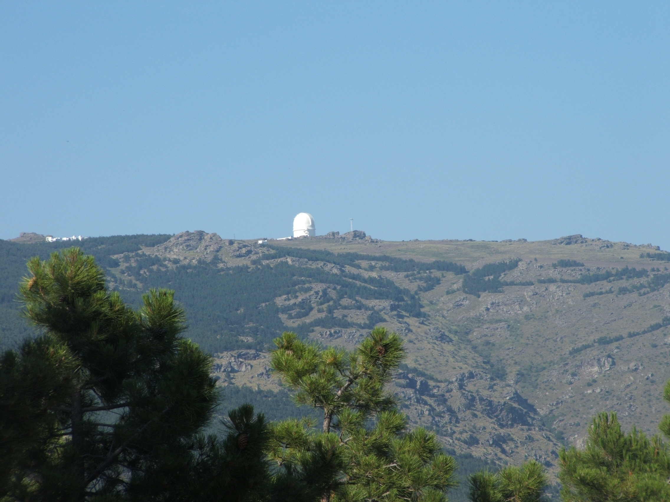 Observatorio astronómico del Calar Alto, en Almería (España).